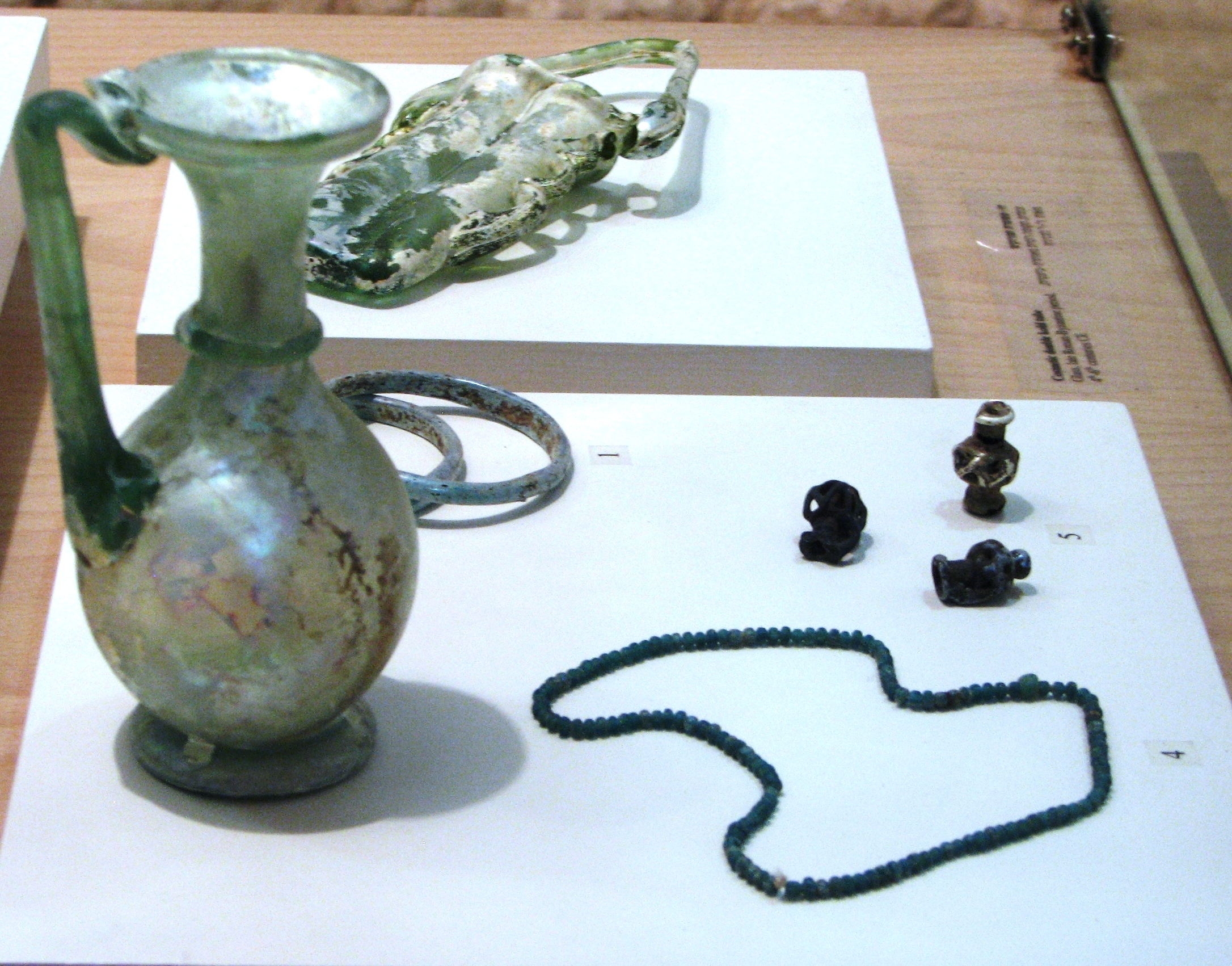 Findings from Hirbet Casra - In Castra Museum, Haifa Israel ממצאים מהאתר הארכאולוגי חירבת קסטרא, היום נמצאים במוזיאון קסטרא העתיקה הנמצא בקניון קסטרא בחיפה מימין מחרוזת מזכוכית, פכיתמזכוכית מאחוריה צמידים מזכוכית ליד המחרוזת תליונים בצורת פכית מזכוכית. מאחורי הפכית דו-שפופרת לתמרוקים מזכוכית. ממצאים מתקופה רומית מאוחרת-ביזנטית